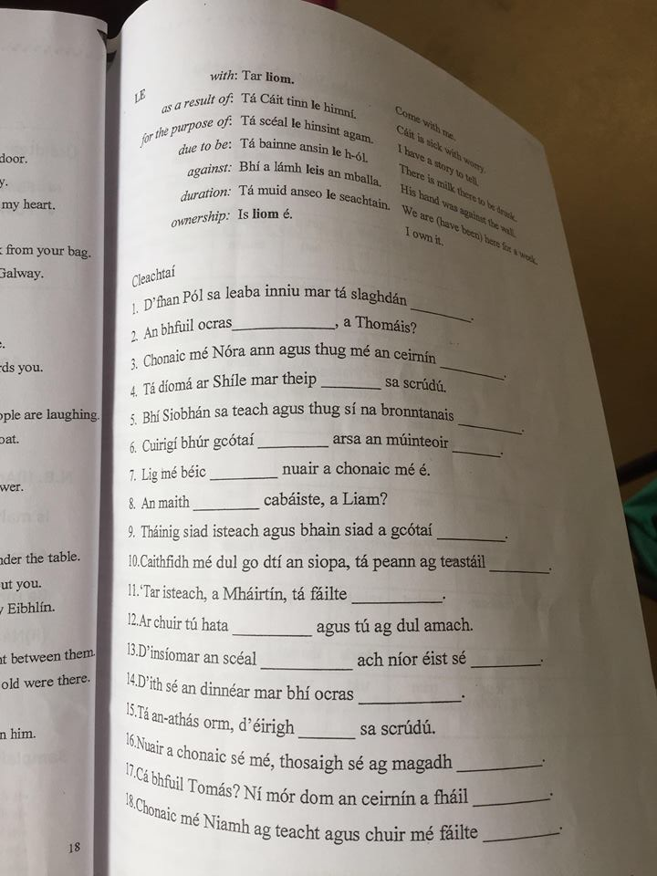 bileog oibre a úsáideann na daltaí